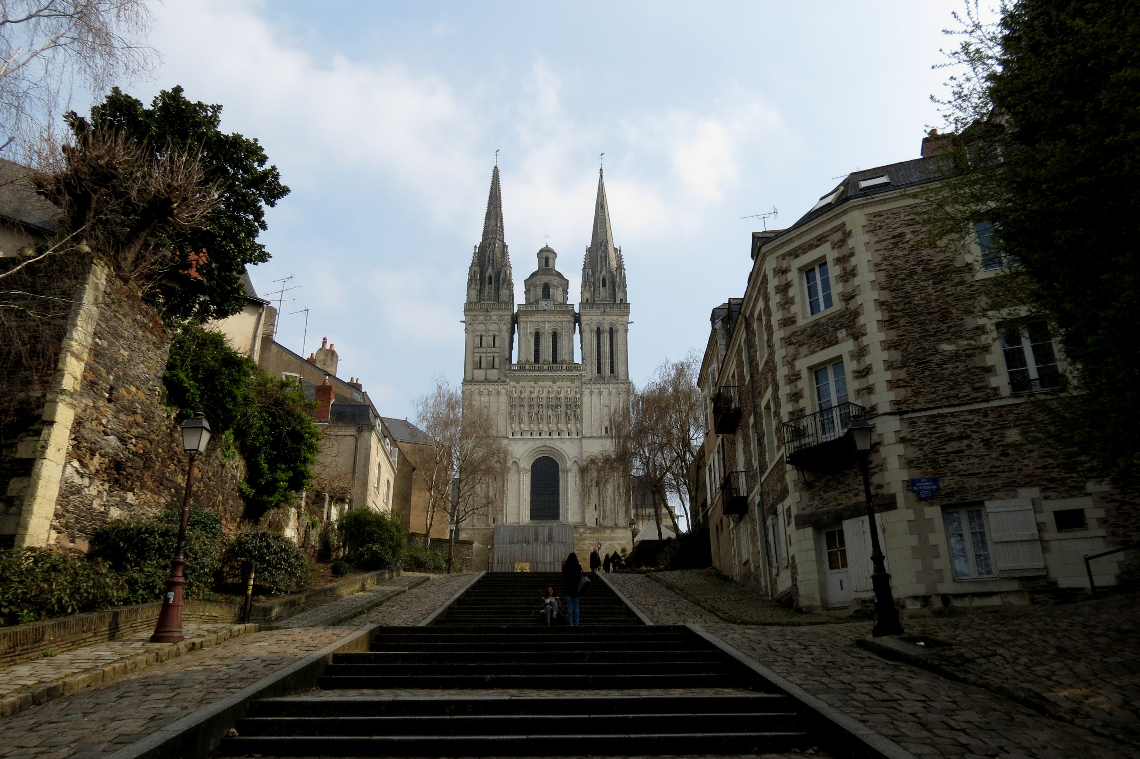 Les châteaux de la Loire.